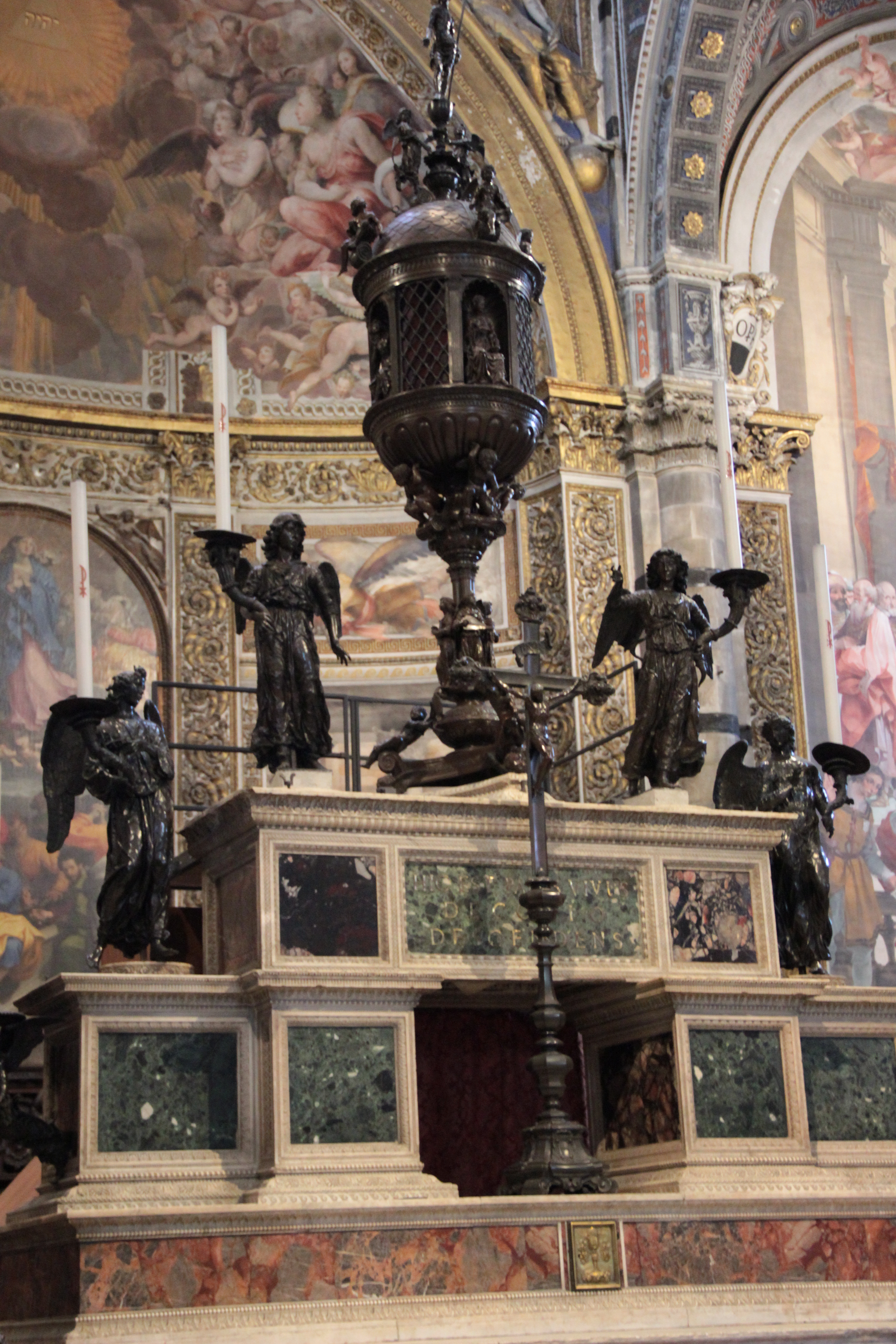 siena 06